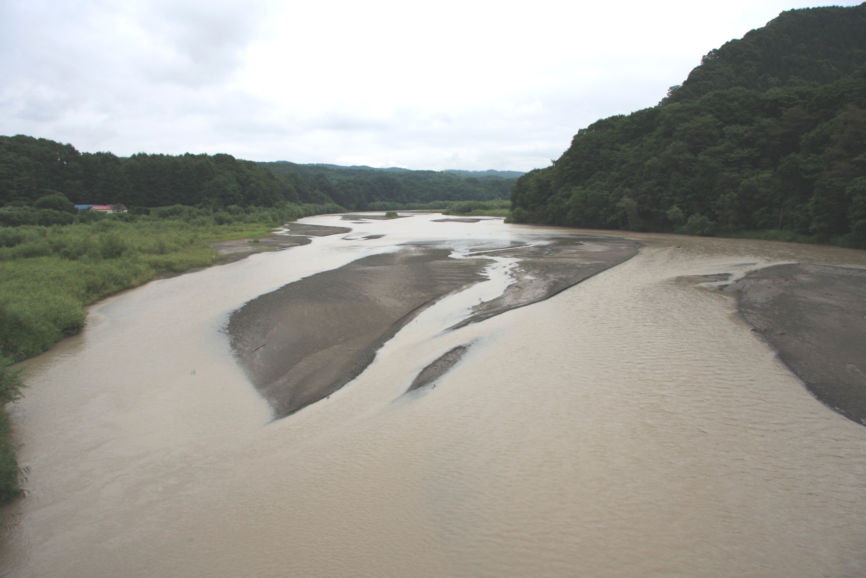 額平川 額平橋より上流を望む